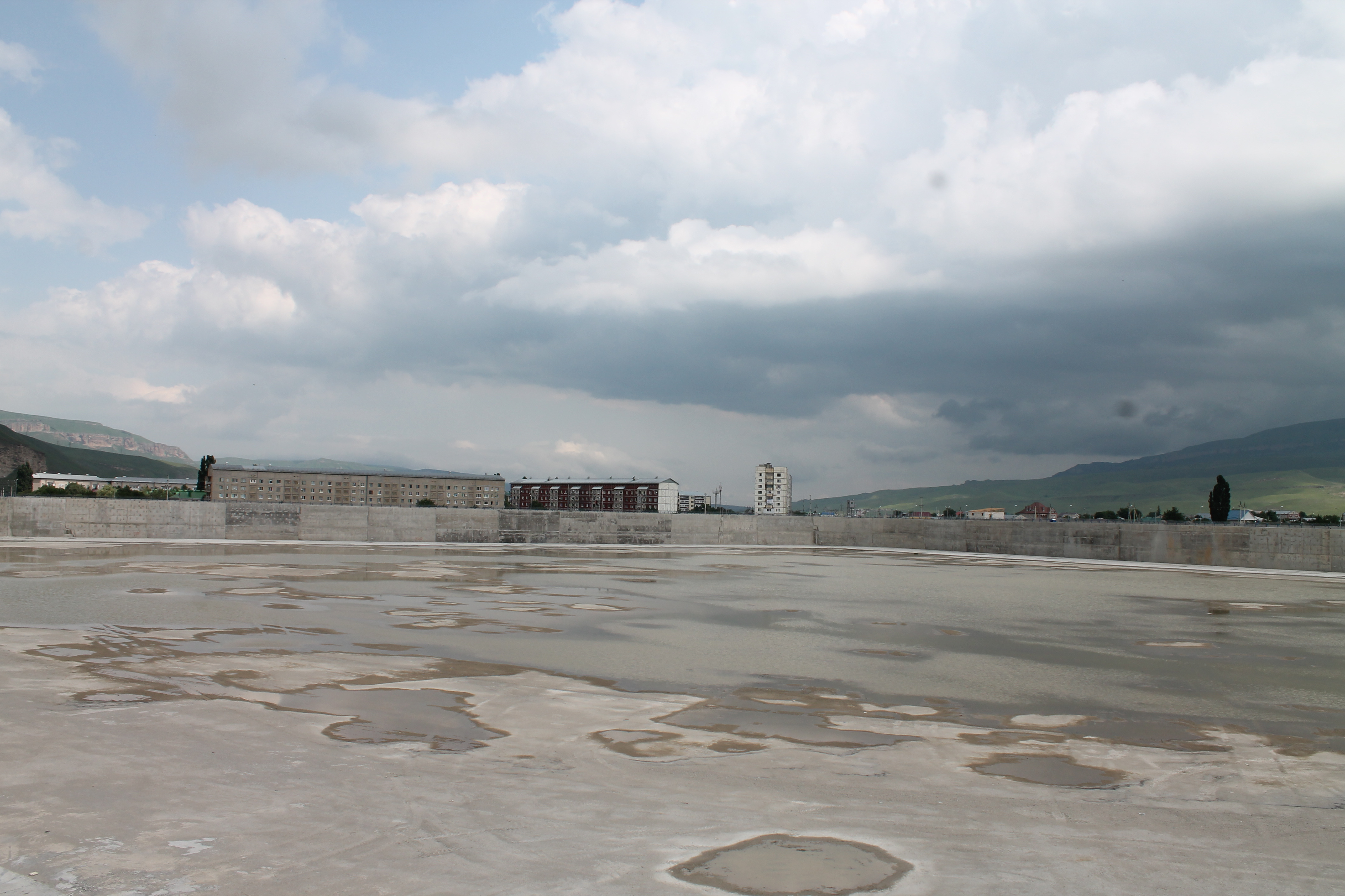 Осушенный нижний бассейн Зеленчукской ГЭС-ГАЭС